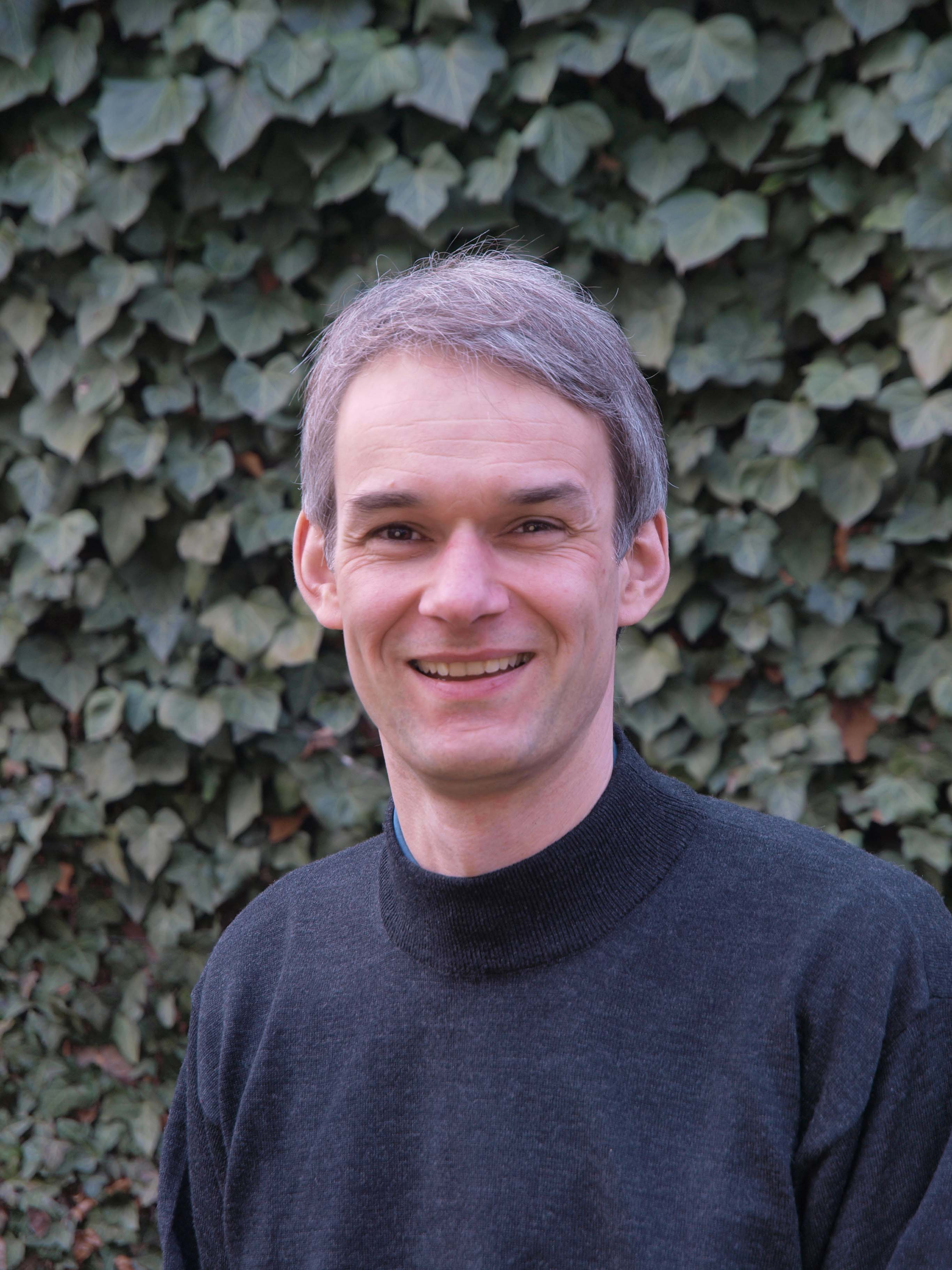 Portrait Christoph Nonn